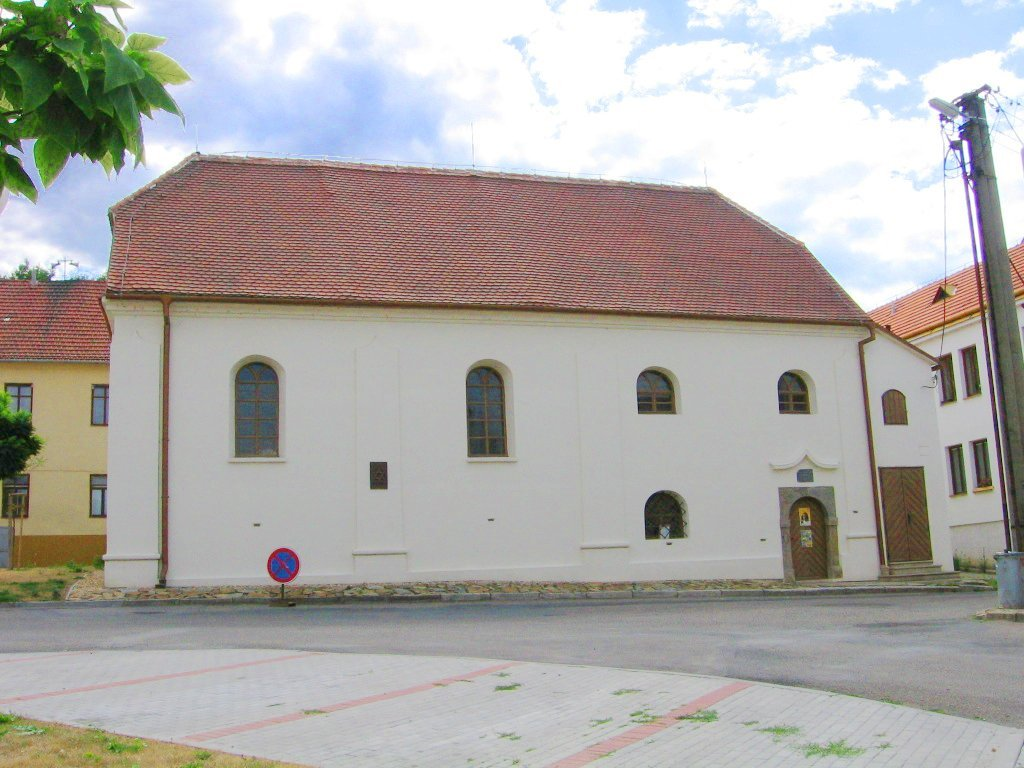 Synagoga v Dolních Kounicích od severu (od náměstí). The synagogue in Dolní Kounice - view from north (from the square).